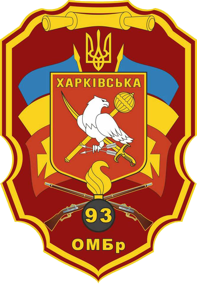 Нарукавний знак, 93 окрема механізована бригада